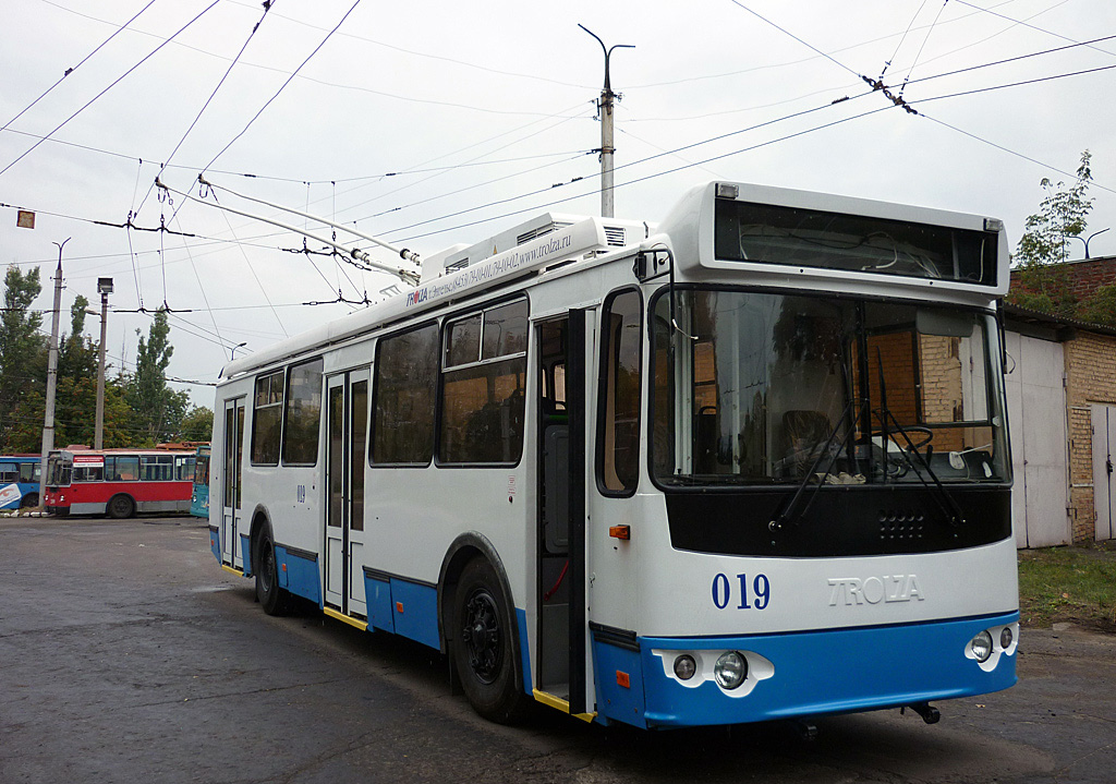 Троллейбус ЗиУ682Г-016 г. Курск